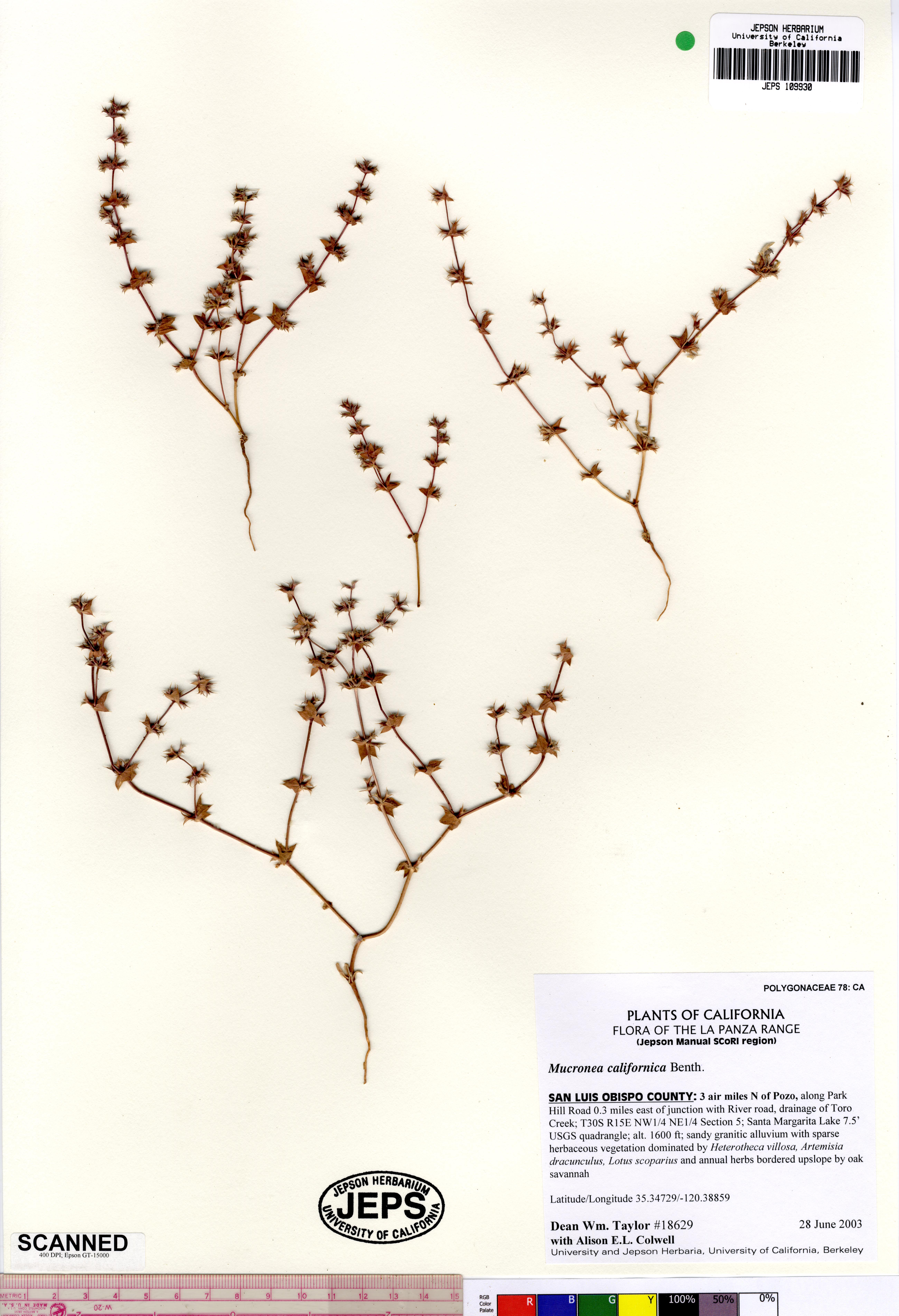 Mucronea californica JEPS109930